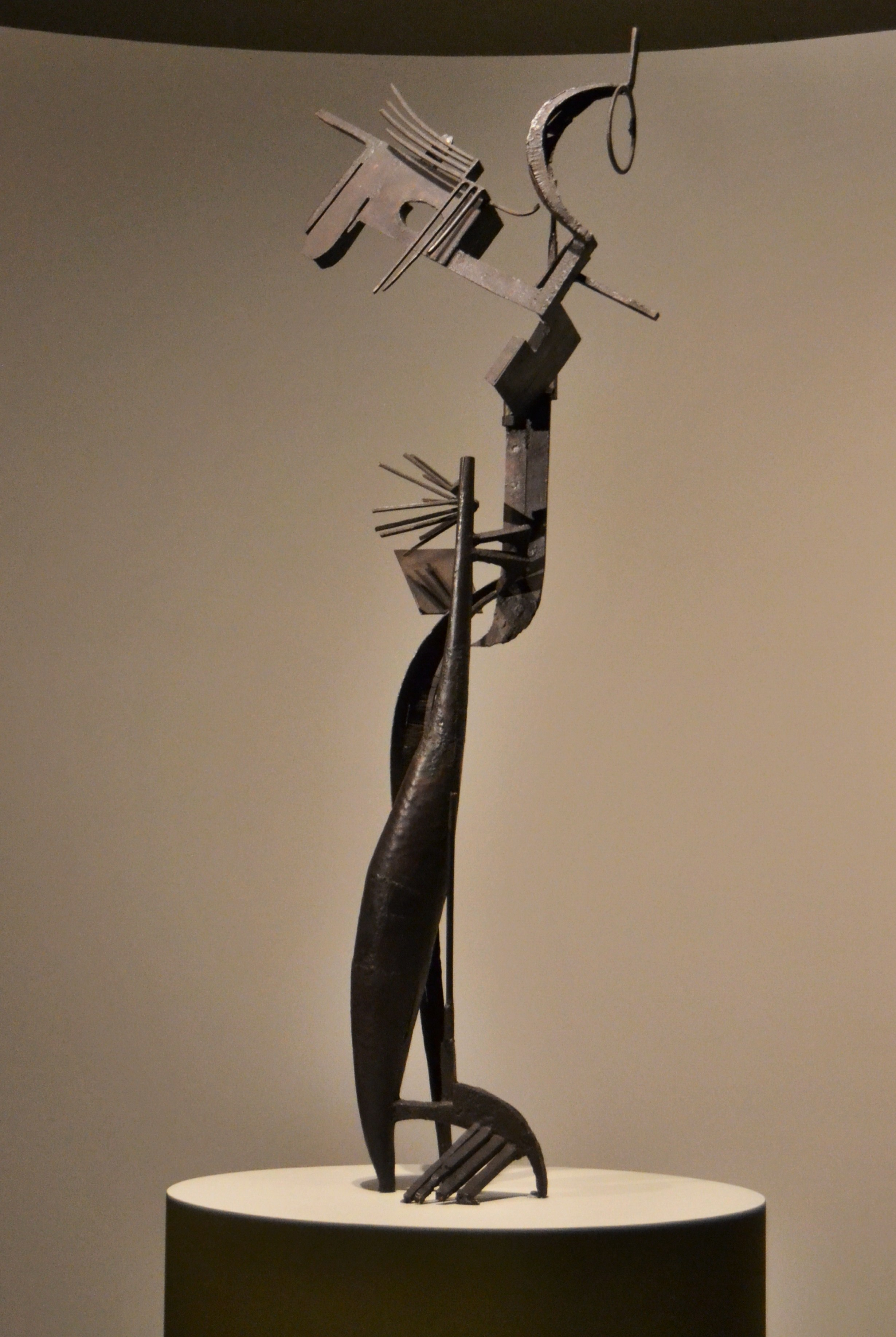 Dona davant l'espill (Femme au miroir), Julio González. Ferro, 208,8 x 60 x 46 cm. 1936 - 1937. Institut Valencià d'Art Modern.